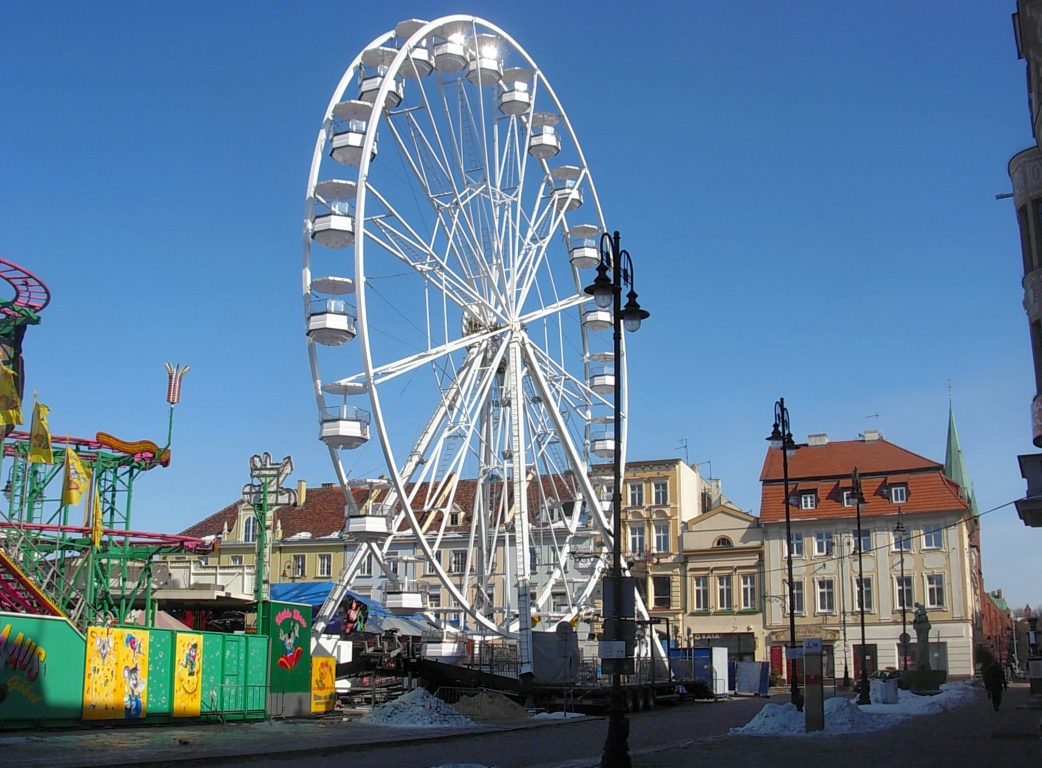 Europejski Festiwal Rozrywki na Starym Rynku w Bydgoszczy